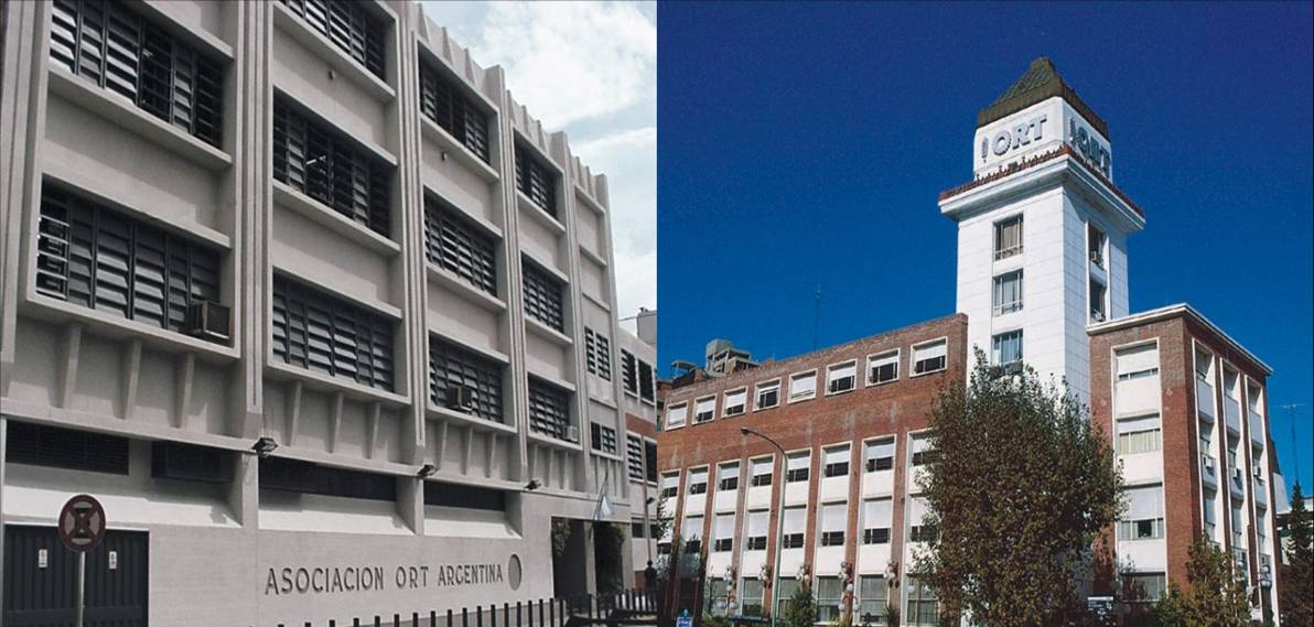 Imagenes ORT